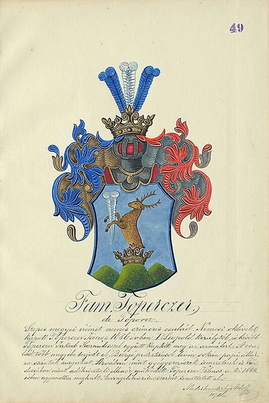 Wappen derer von Toperczer